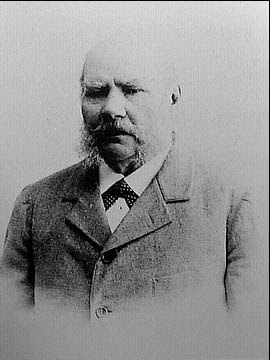 Густав Фаберже (1814-1893), ювелир